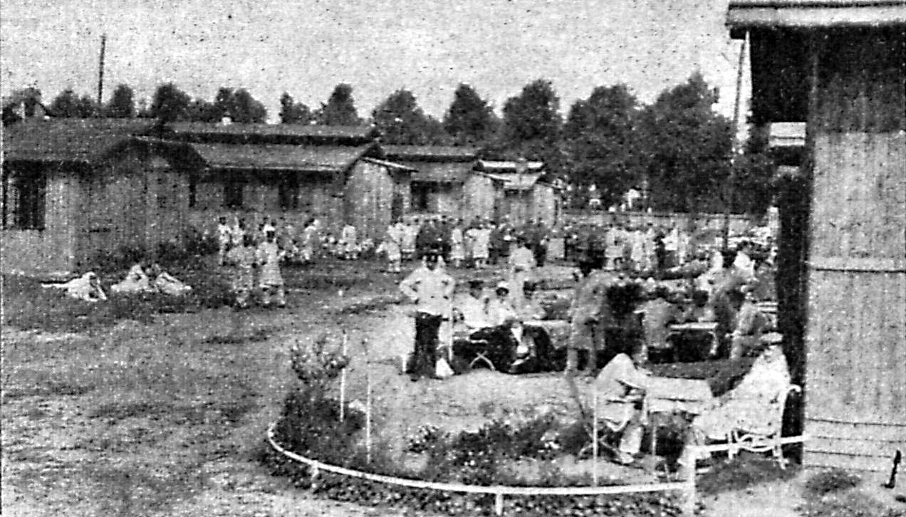 Tägliches Konzert der Regiments- oder Polizeikapelle